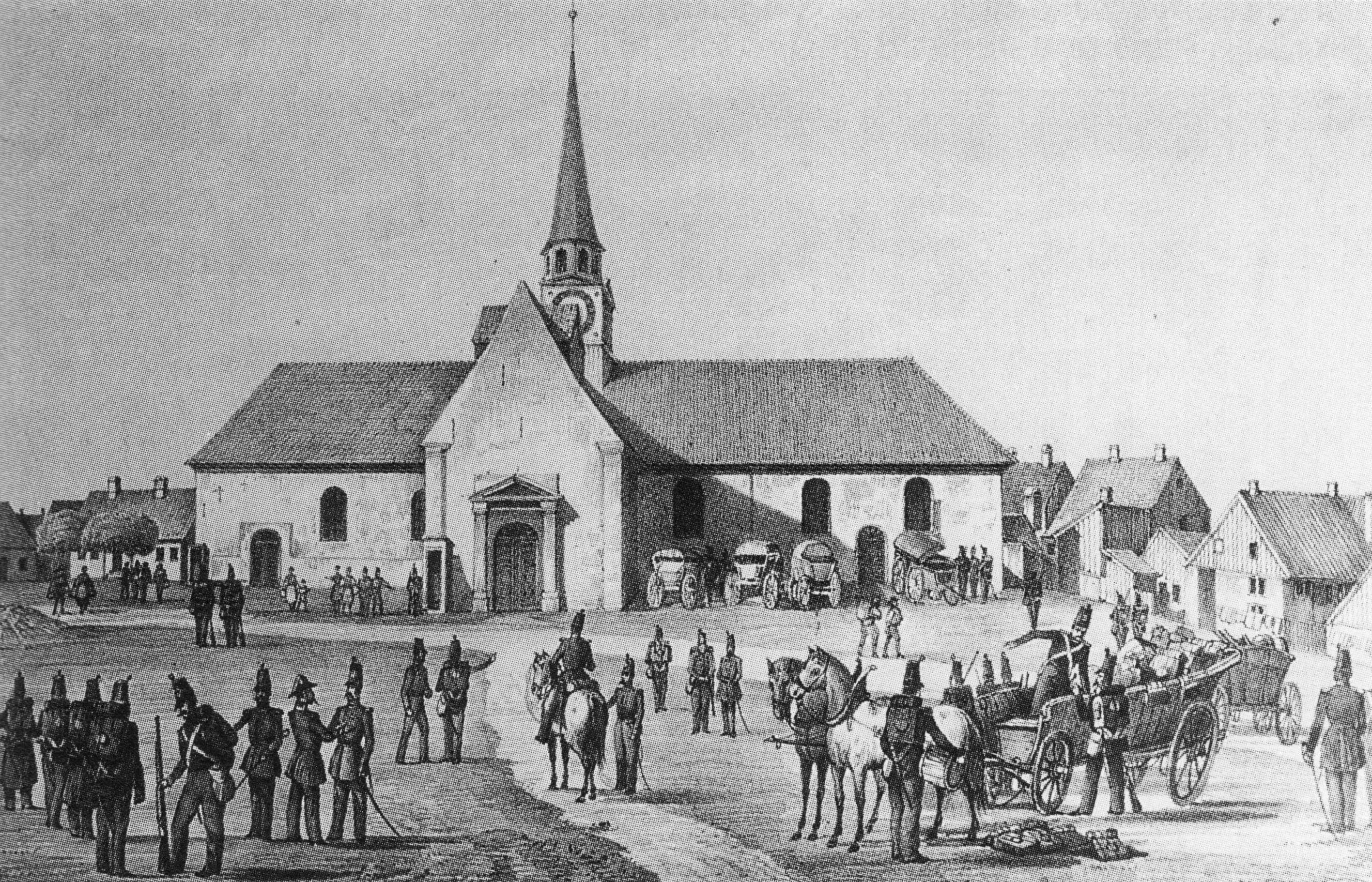 Lithographie, 1849. Der Kirchplatz von Apenrade. Deutsche Reichstruppen vor der St. Nikolai-Kirche.